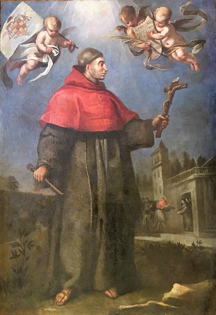 Cuadro del siglo XVII del Cardenal Cisneros en el Convento de San Juan de la Penitencia de Alcalá de Henares (Comunidad de Madrid - España). Es un óleo sobre lienzo, que mide 211 x 149 cm.